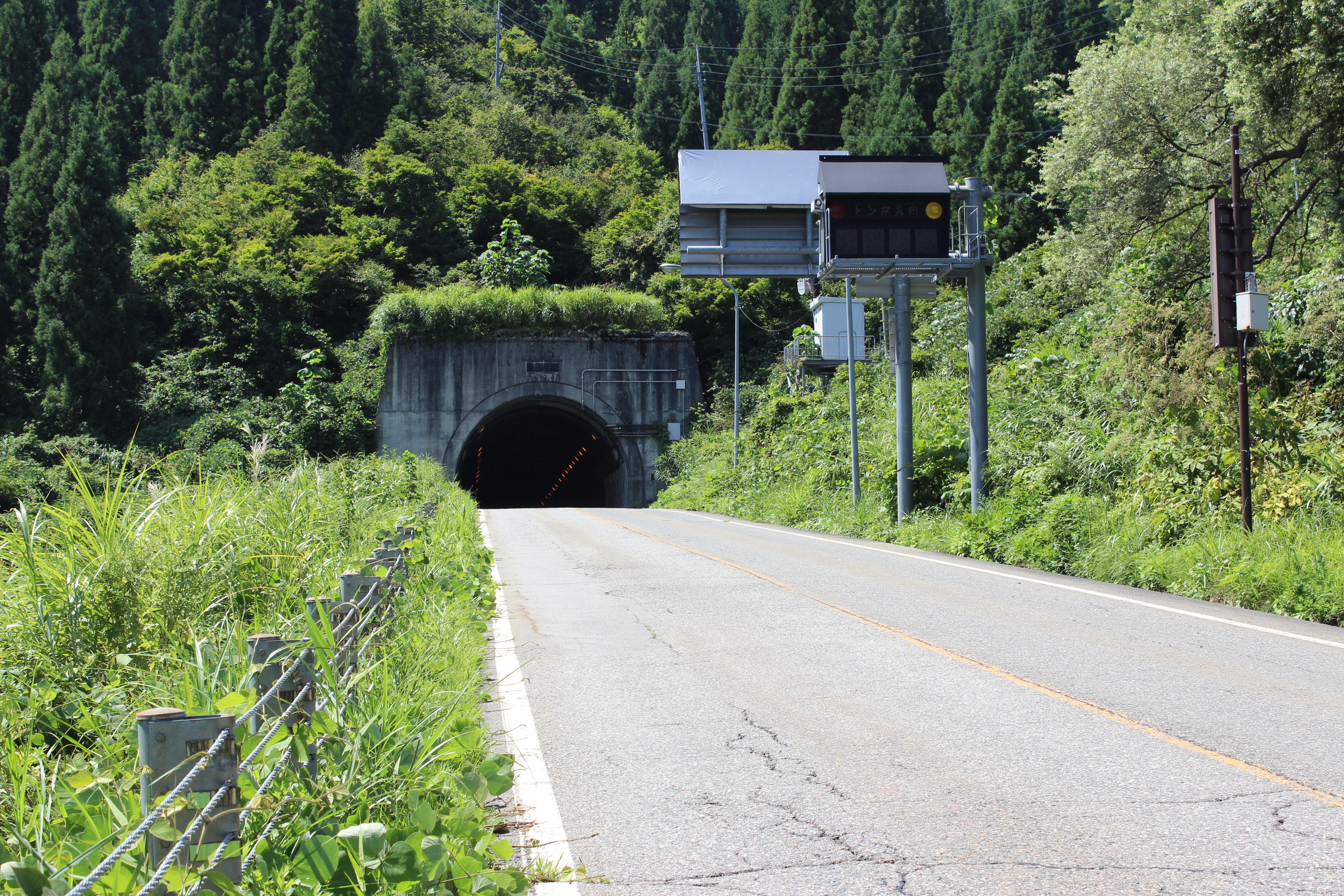 八箇トンネル（南魚沼口）